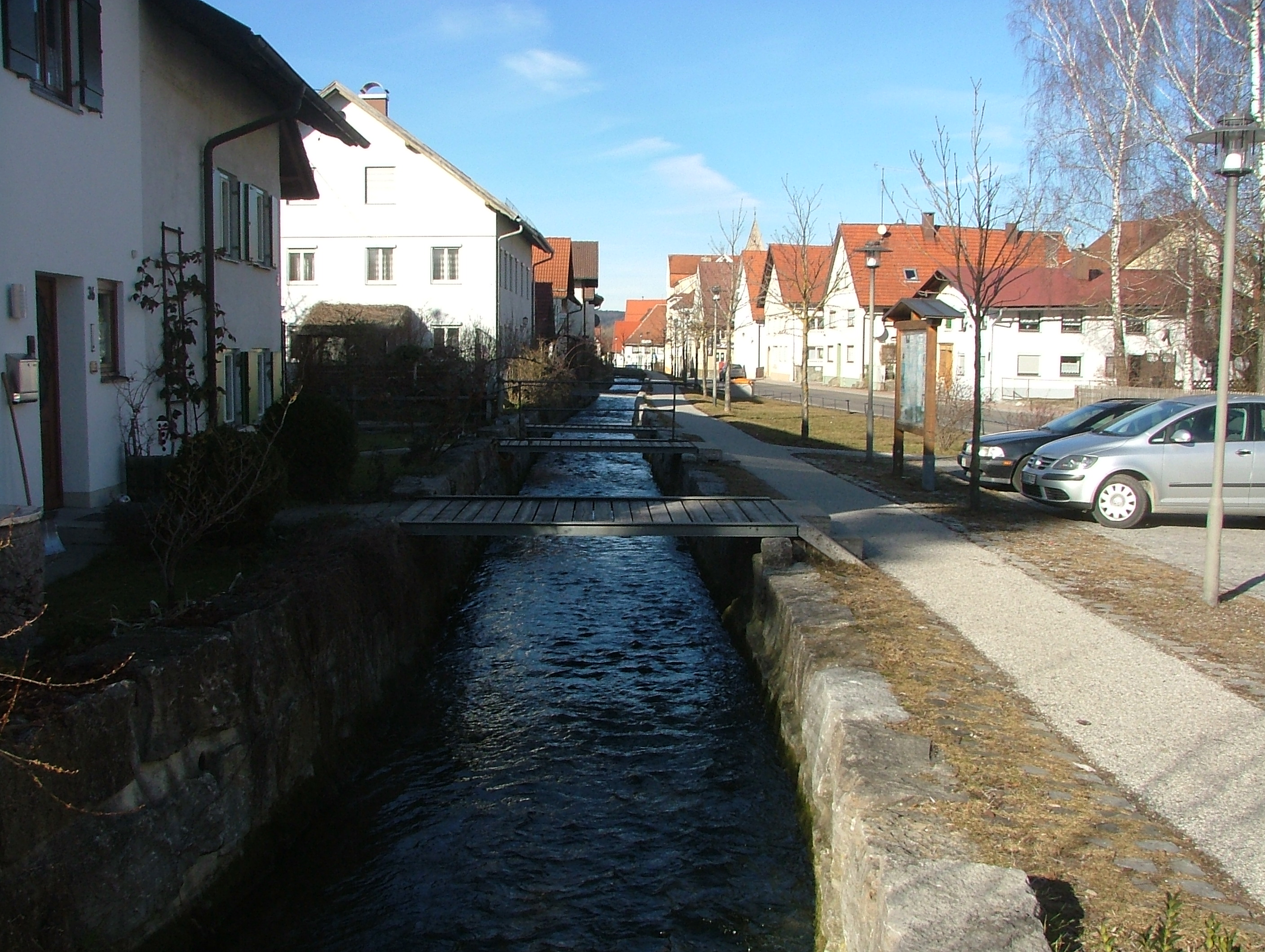 Oberlauf der östlichen Günz in Obergünzburg